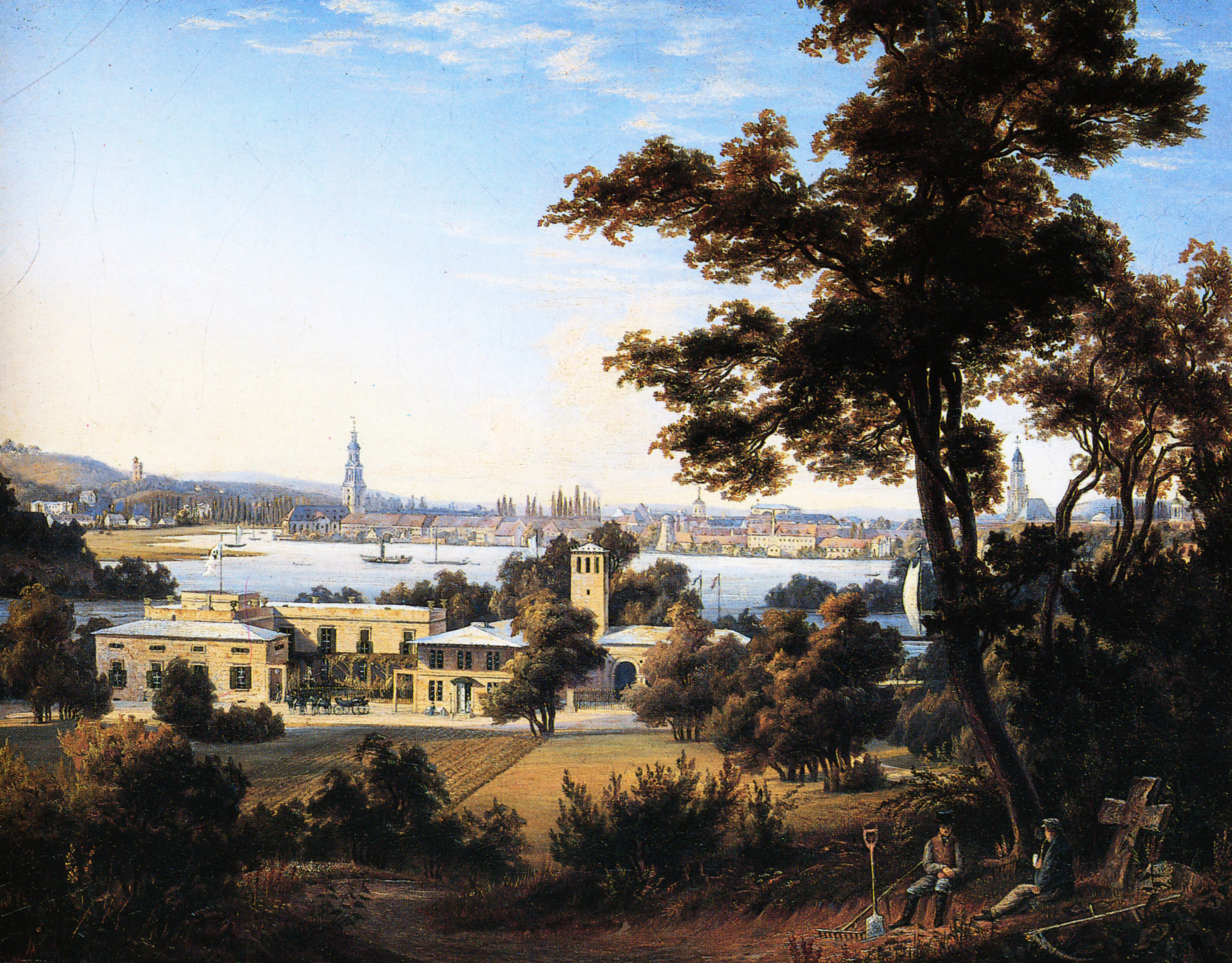 rechts neben dem Ausruhenden das nach rechts geneigte steinerne Sühnekreuz, das bereits z. Zt. des Prinzen Carl nahe der heute stark entstellten exedraförmigen Römischen Bank im Park gestanden hat.